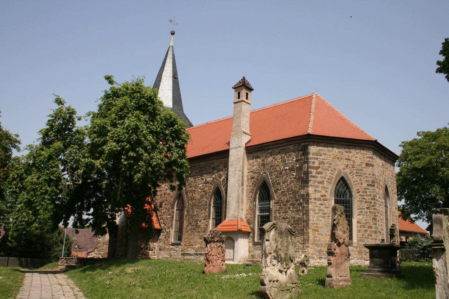 Volkstedt Church St. Peter And Paul from east